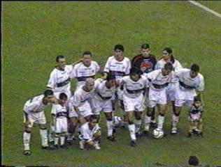 Squad of Olimpia Asunción in 2002